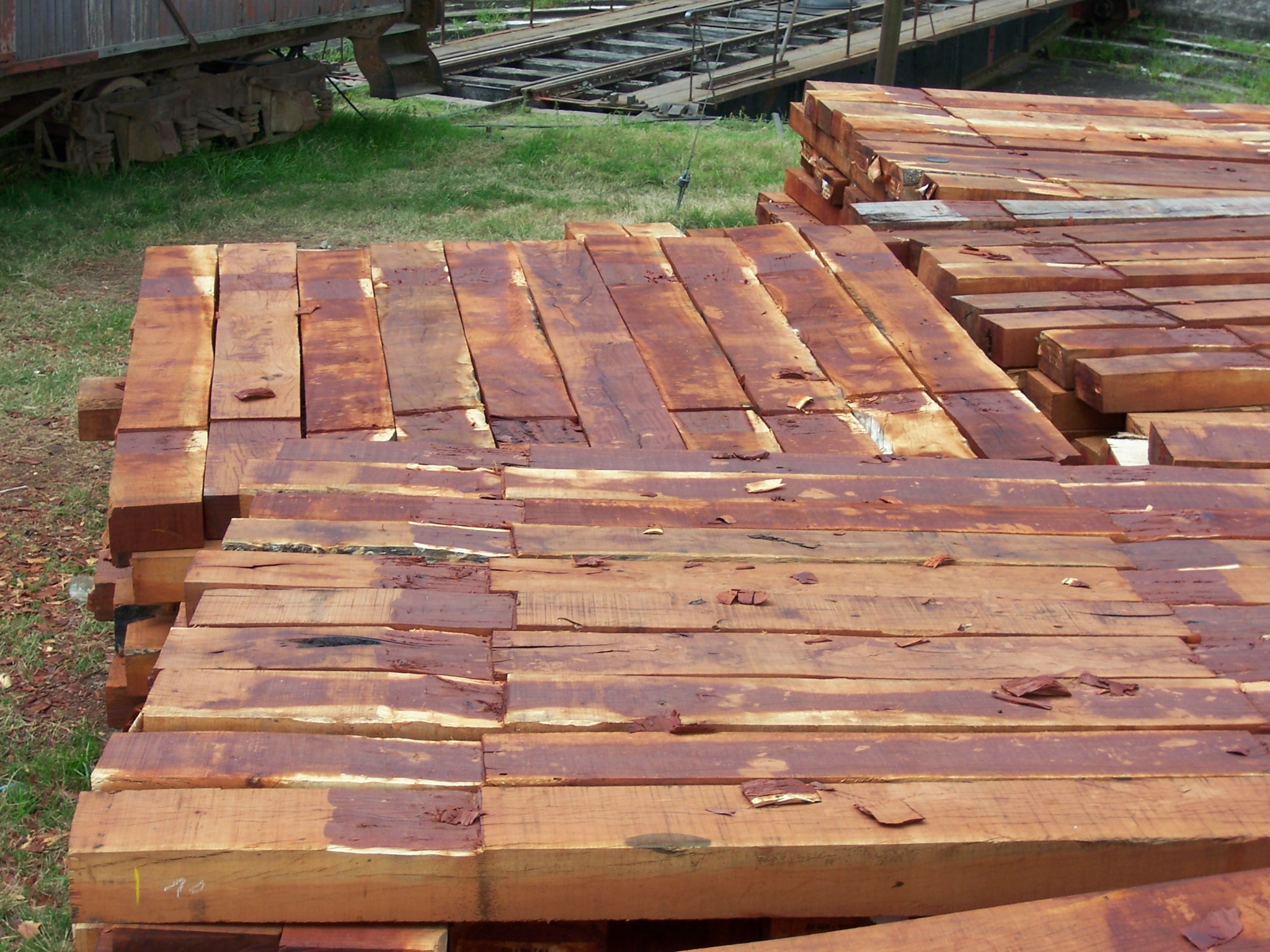 Durmientes de madera de quebracho colorado de origen argentino. Material utilizado en la renovación de la Línea a Rivera, zona de Tacurembó, Uruguay. Se puede observar el entallado de los durmientes, que cumple la función de dar a los rieles una inclinación de 1:20 respecto de la vertical.